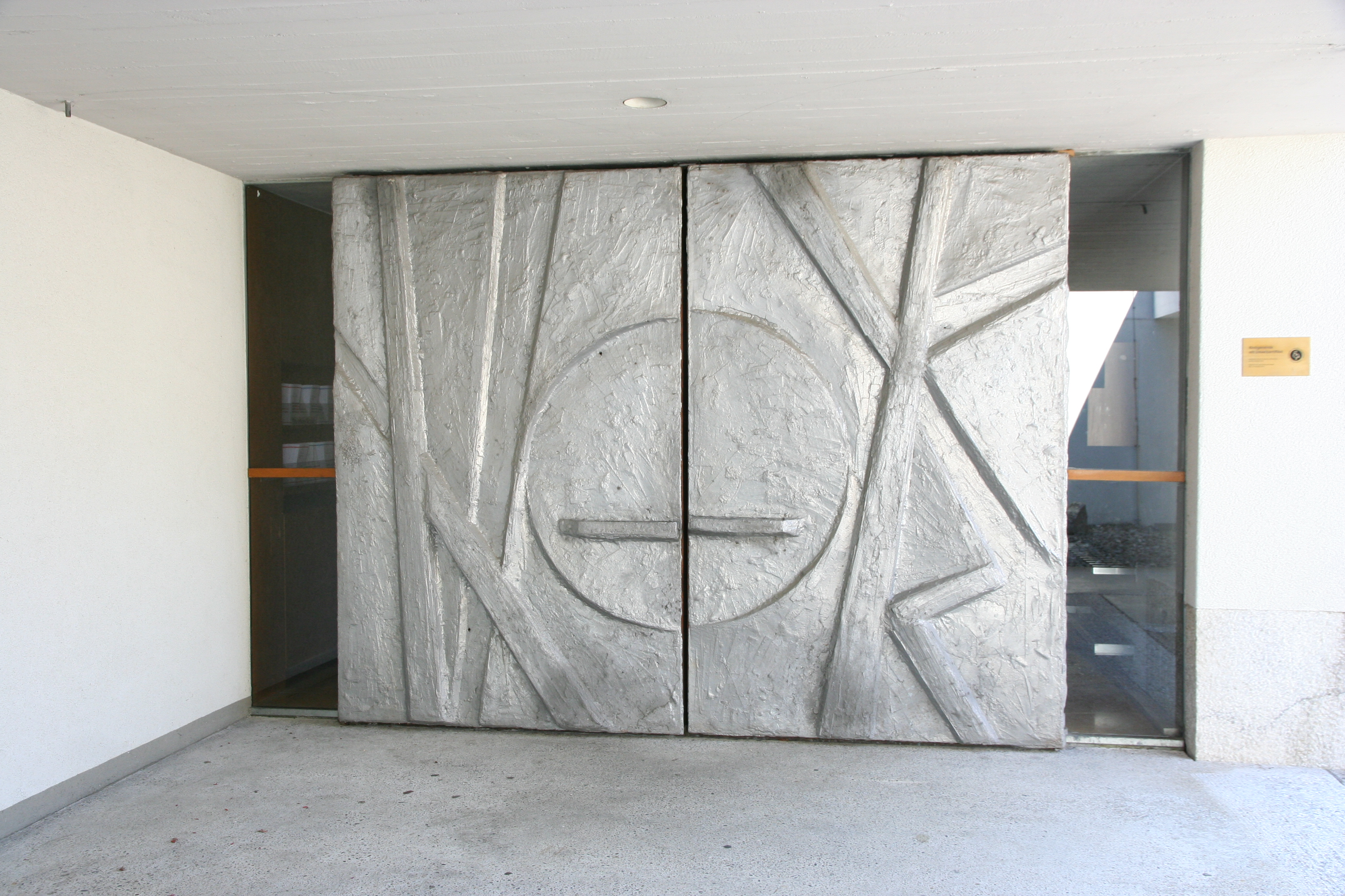 Römisch-katholische Pfarrkirche St. Antonius Münchwilen TG